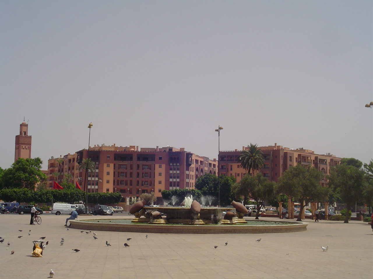 Gueliz Marrakech